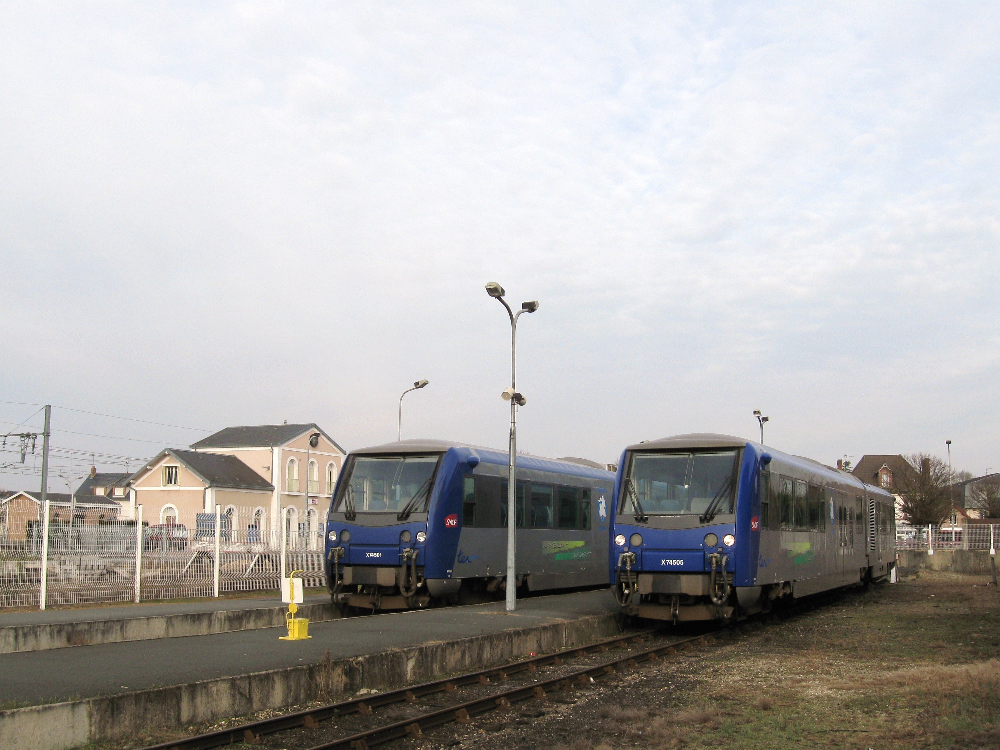 Autorails X 74501 et X 74505 (TER Centre) du chemin de fer à voie métrique du Blanc-Argent à son terminus en gare de Salbris, en correspondance avec la ligne Orléans-Vierzon (au fond à gauche), Salbris, Loir-et-Cher, France